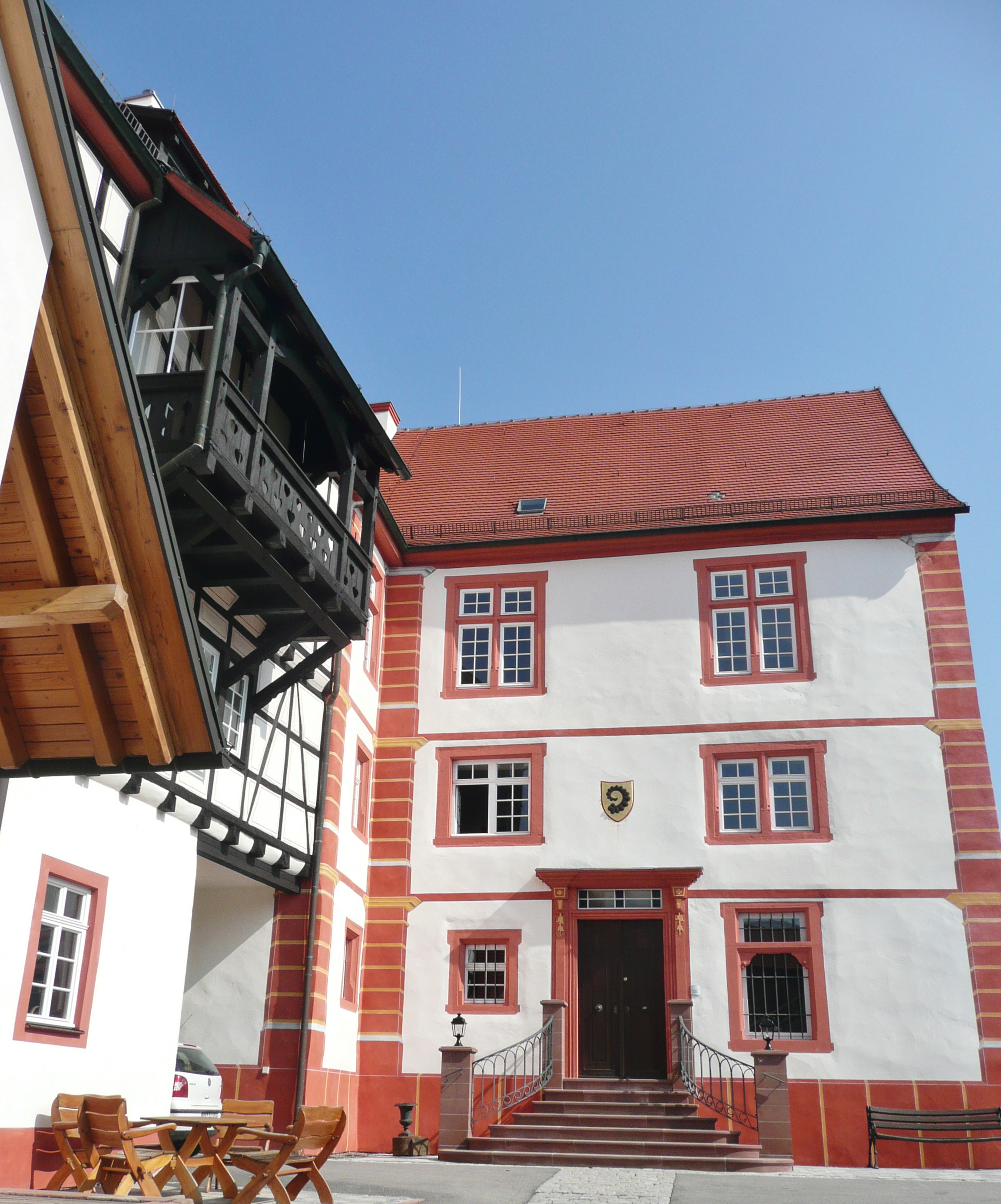 Schloss Obermönsheim (Schloss Hohengeissberg): Schloss der Freiherren von Gaisberg, Freiherr Eduard von Phull-Rieppur starb auf Schloss Obermönsheim im Januar 1918